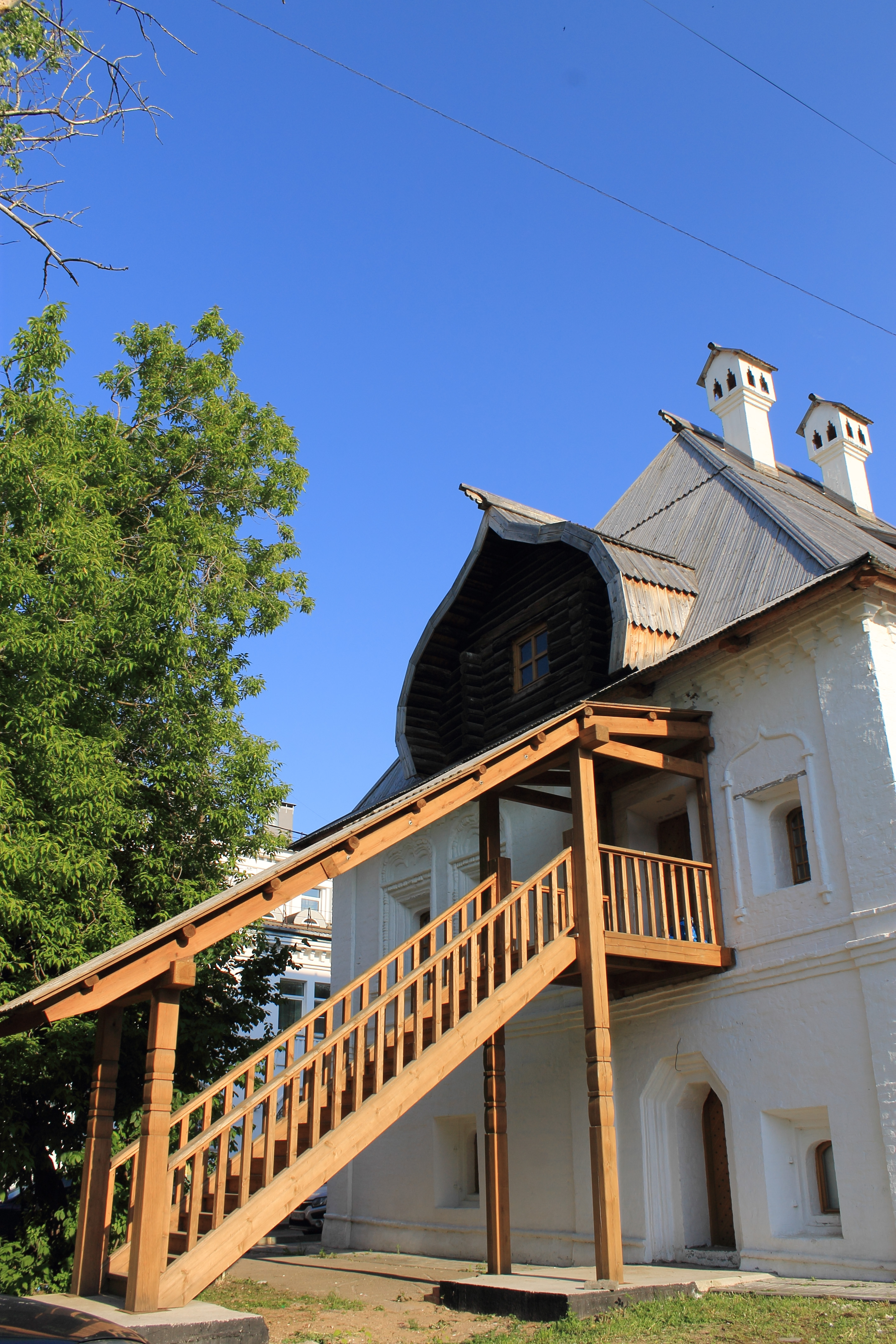 Корпус двухэтажный: улица Гоголя, 52 (лит. А), Нижний Новгород, Нижегородская область